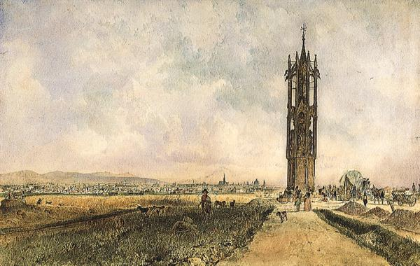 Wegsäule Spinnerin am Kreuz.